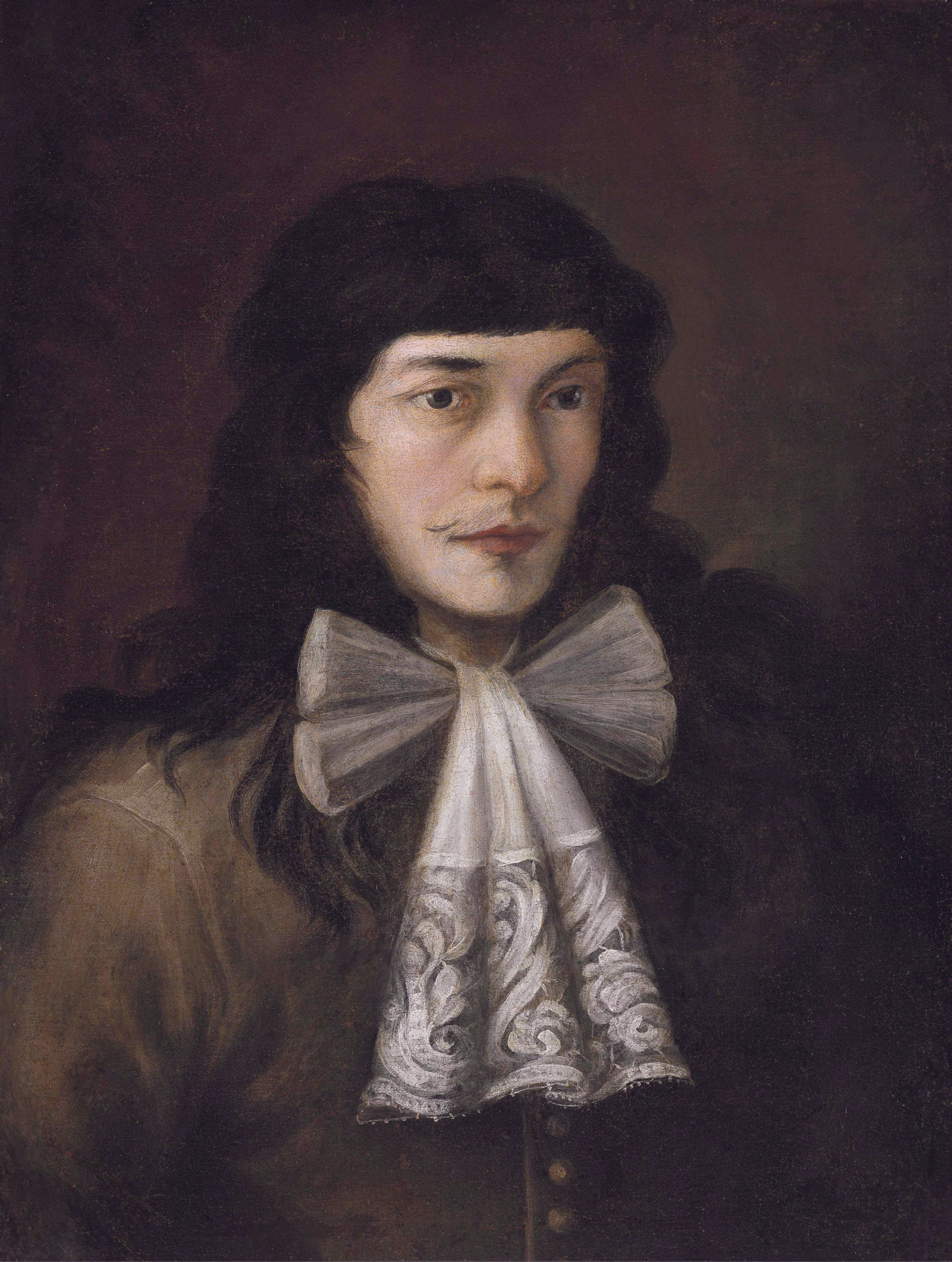 Self-portrait